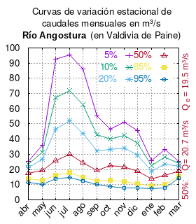 Curva de Variación Estacional del río Angostura en Valdivia de Paine. # cita publicación #| apellido = Dirección General de Aguas #| nombre = #| enlace-autor = Ministerio de Obras Públicas (Chile) #| título = Diagnóstico y clasificación de los cursos y cuerpos de agua según objetivos de calidad. Cuenca del río Maipo #| ubicación = Santiago de Chile #| editorial = Ministerio de Obras Públicas (Chile) #| año = 2004 #| edición = #| url = #| urlarchivo = #| fechaarchivo = #| ref = harv # Tabla 4.17: Estación Angostura en Valdivia de Paine pág. 69 mes 5% 10% 20% 50% 85% 95% abr 25.37 23.52 21.38 17.64 13.68 11.67 may 36.02 31.44 26.67 19.47 13.07 10.17 jun 92.67 67.07 46.58 25.99 16.26 13.91 jul 95.55 71.94 51.89 29.84 17.90 14.60 ago 86.07 62.65 43.70 24.33 14.94 12.61 sep 55.36 42.91 32.04 19.58 12.38 10.27 oct 46.75 40.02 33.01 22.41 13.00 8.73 nov 51.29 42.62 33.93 21.63 11.89 8.05 dic 45.40 37.38 29.54 18.83 10.82 7.81 ene 25.79 22.48 19.04 13.85 9.36 7.44 feb 33.21 28.32 23.35 16.15 10.26 7.86 mar 25.48 23.88 22.07 19.00 15.79 14.16 This plot was created with Gnuplot.